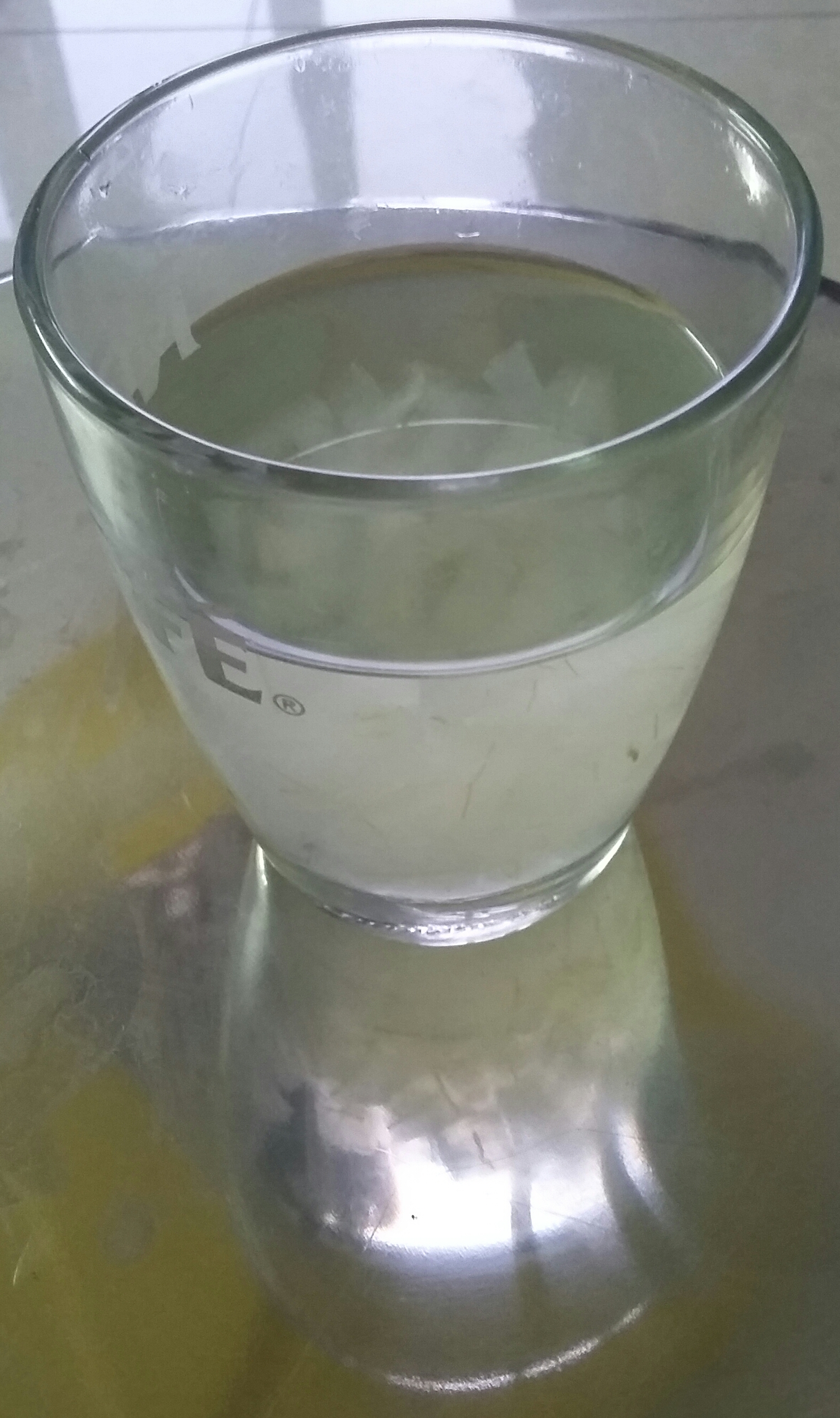 Hình chụp bằng máy điện thoại cá nhân rồi tải lên để minh họa cho bài viêt